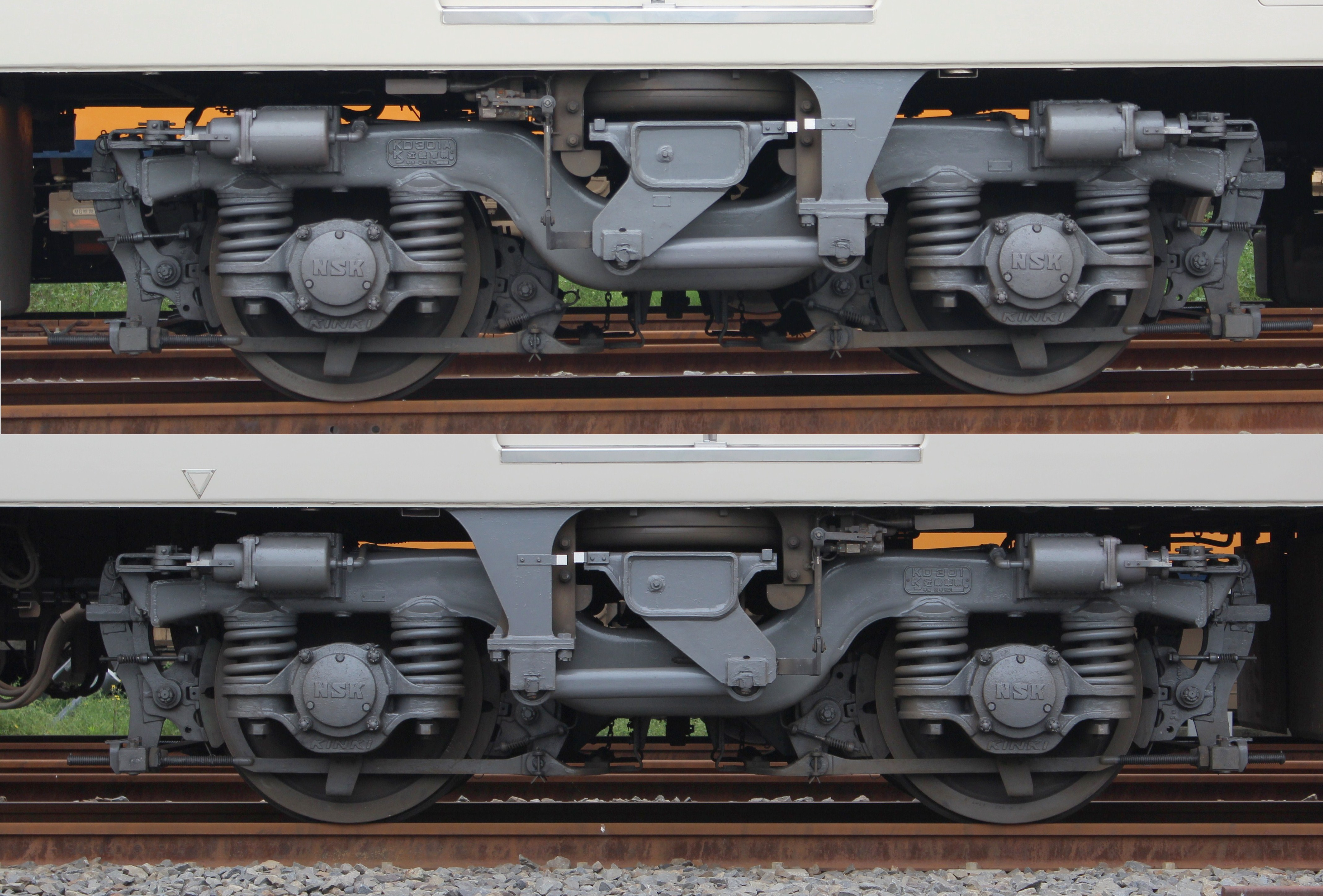 近鉄5200系 KD-301形、KD-301A形台車